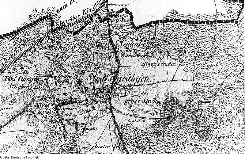 Original image description from the Deutsche Fotothek Straßgräbchen. Oberreit, Sect. Bautzen, 1844/46